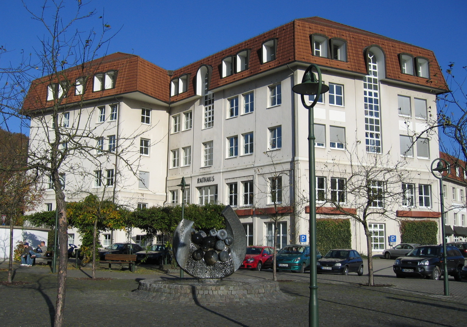 Description: Rathaus in Sundern Source: selbst fotografiert Date: 31. Okt. 2005 Author: Bubo